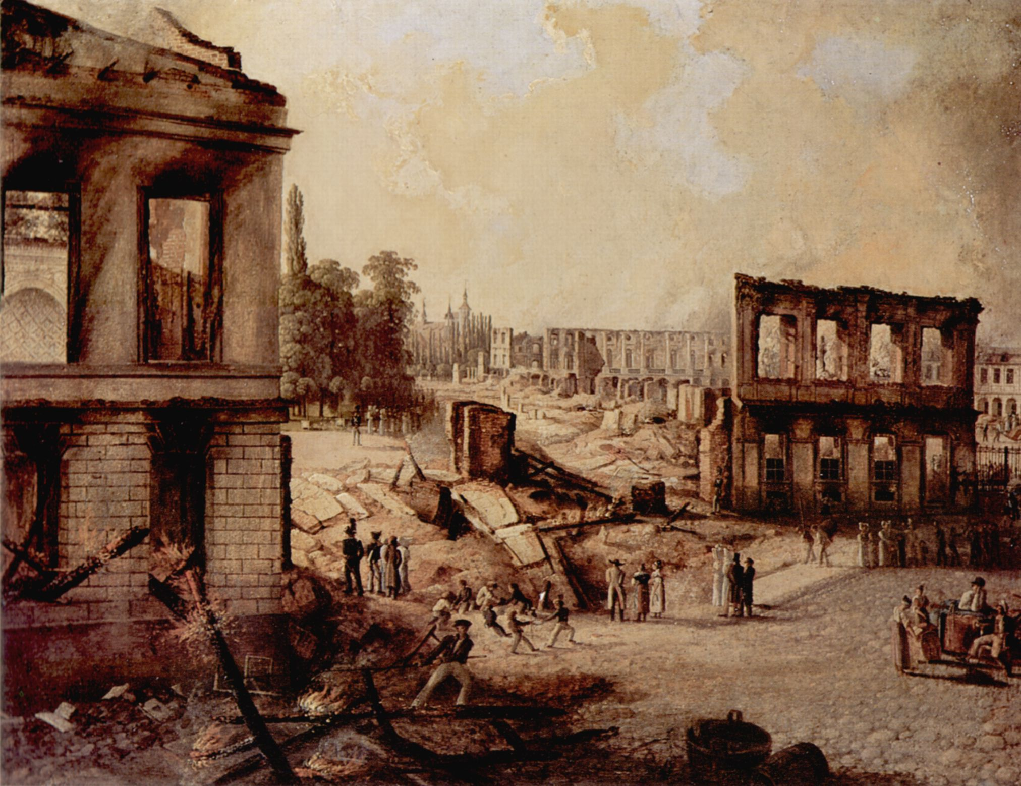 Karl Schröder: Braunschweig, Schlossruine von Südosten.